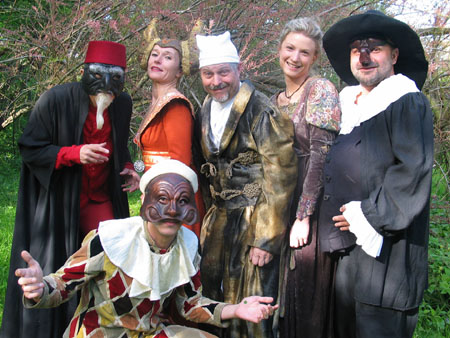 Karl-Theater: Szene aus "Volpone"